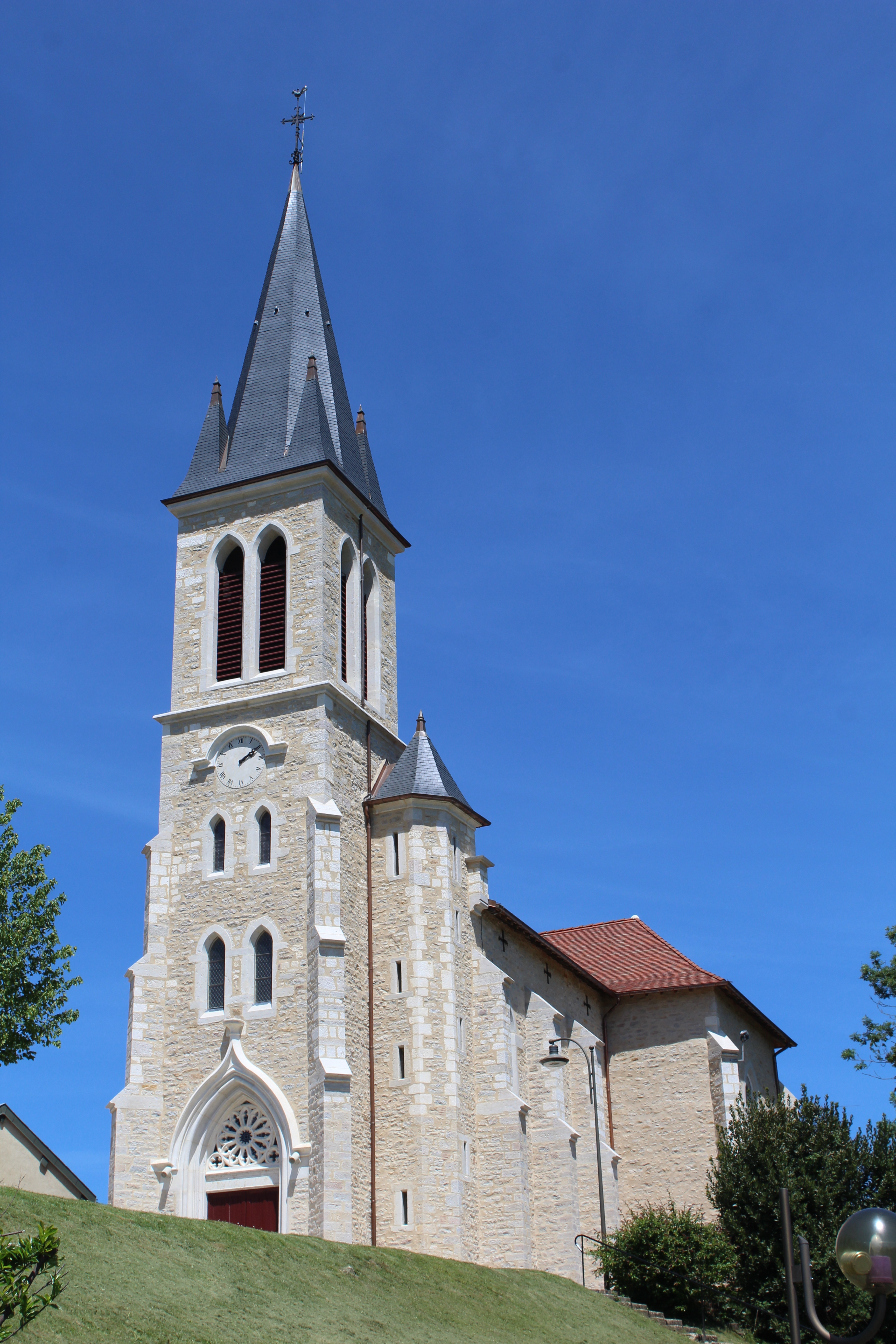 Église Saint-Clair de Montagnat.